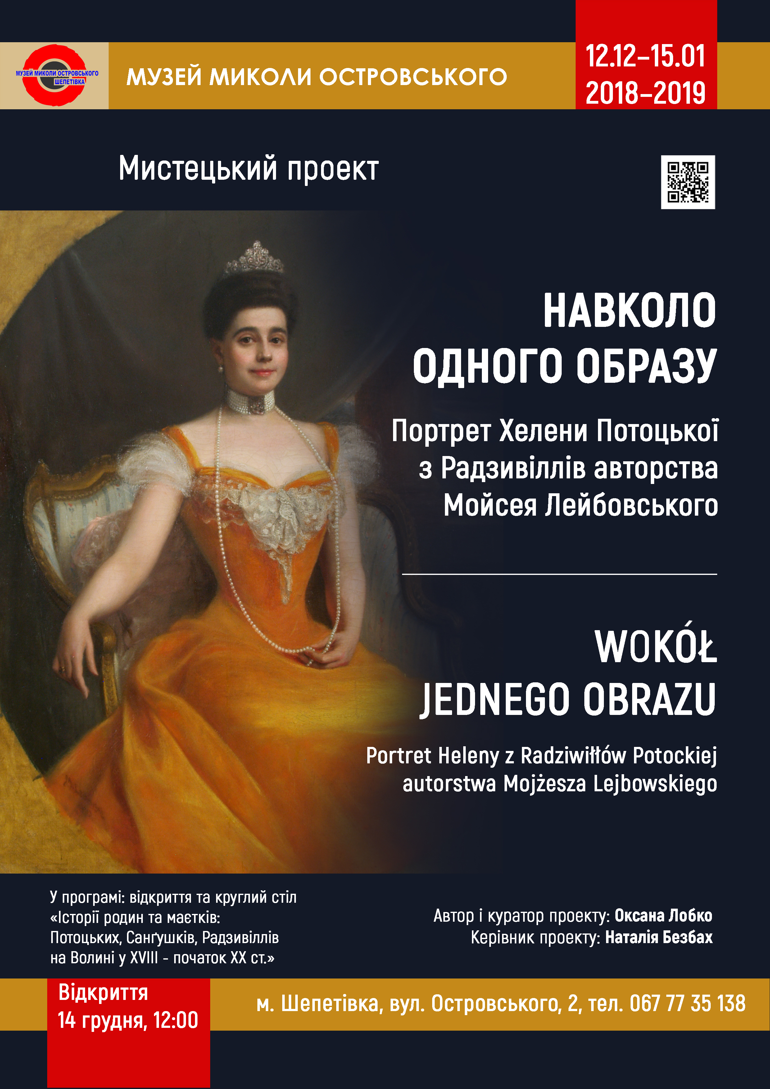 Афіша з авторської виставки Оксани Лобко "Навкого одного образу. Портрет Хелени Потоцької авторства Мойсея Лейбовського"